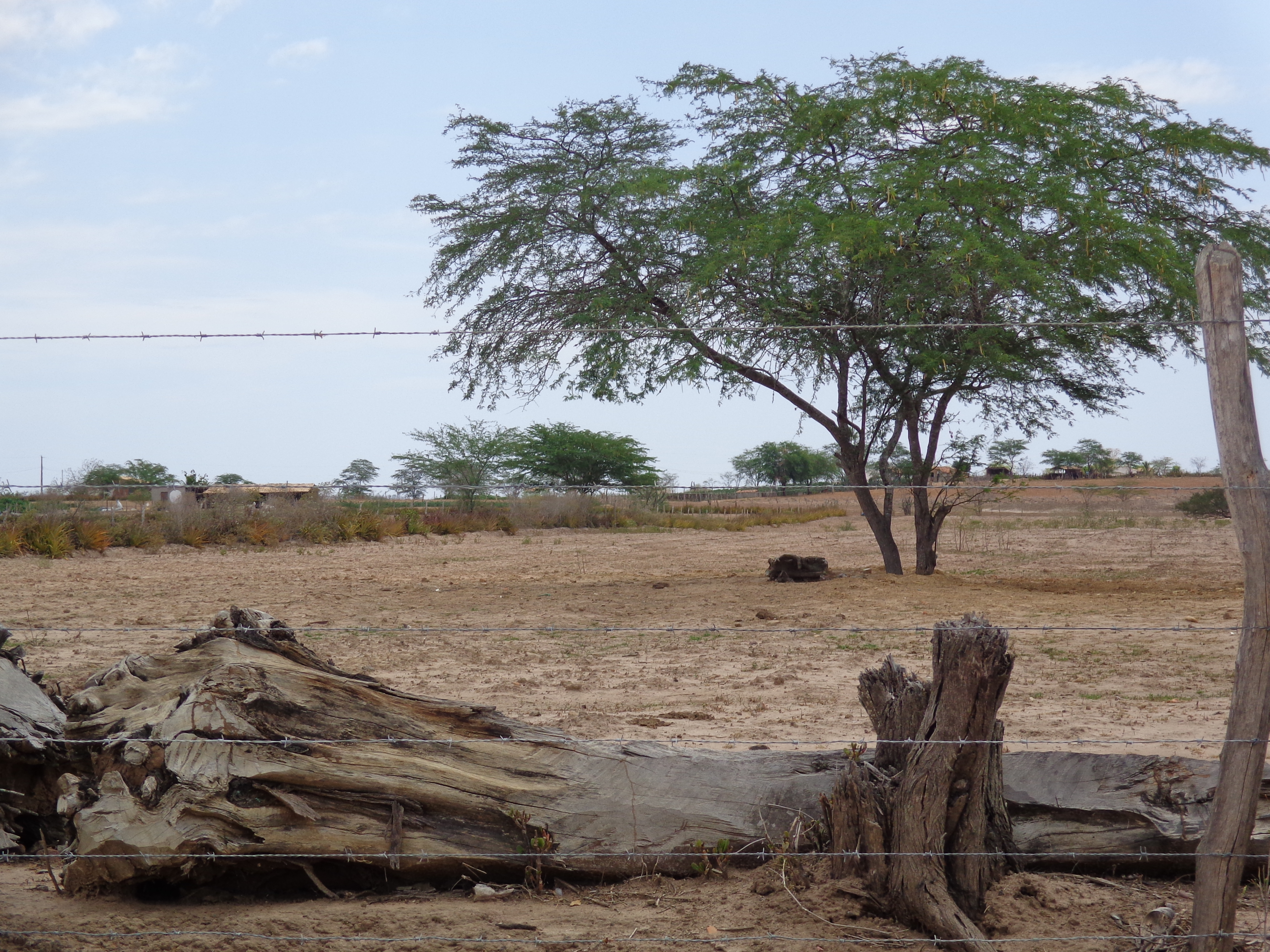 Município de Poço Verde - Pastagem Seca em meio ao clima árido do sertão.